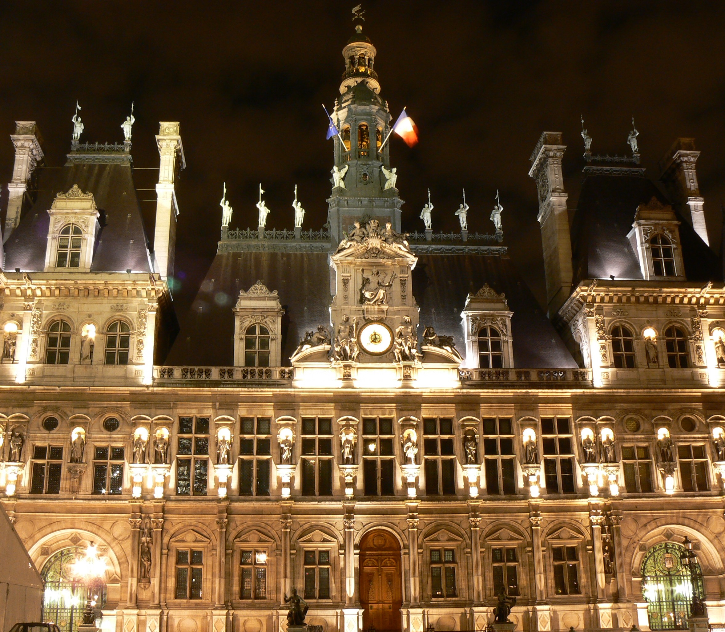 Hotel De Ville - Paris